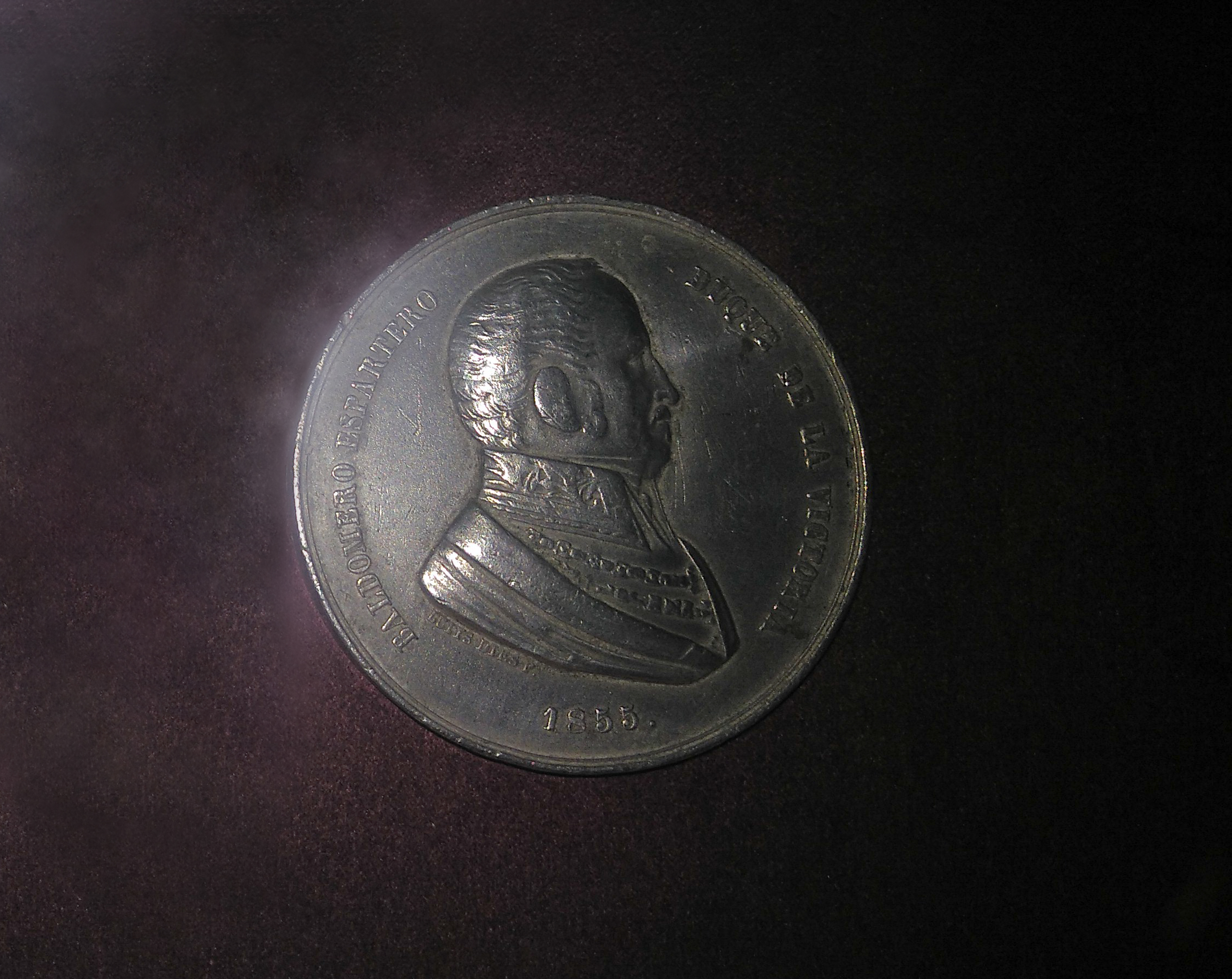 Anverso de medalla con la efigie de Baldomero Espartero. Leyenda: Baldomero Espartero, Duque de la Victoria, 1855. Palacio de Cervelló (Valencia).